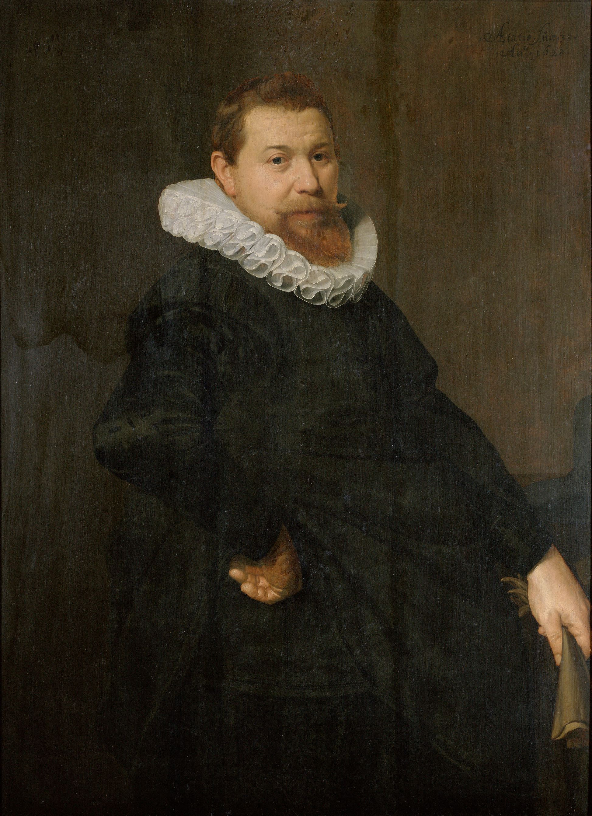 artikel: Jan van Foreest (1586-1651)